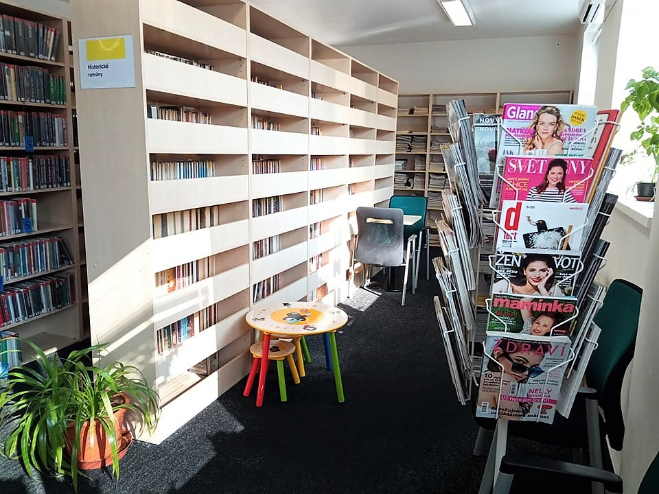 Knihovna Dubina interiér